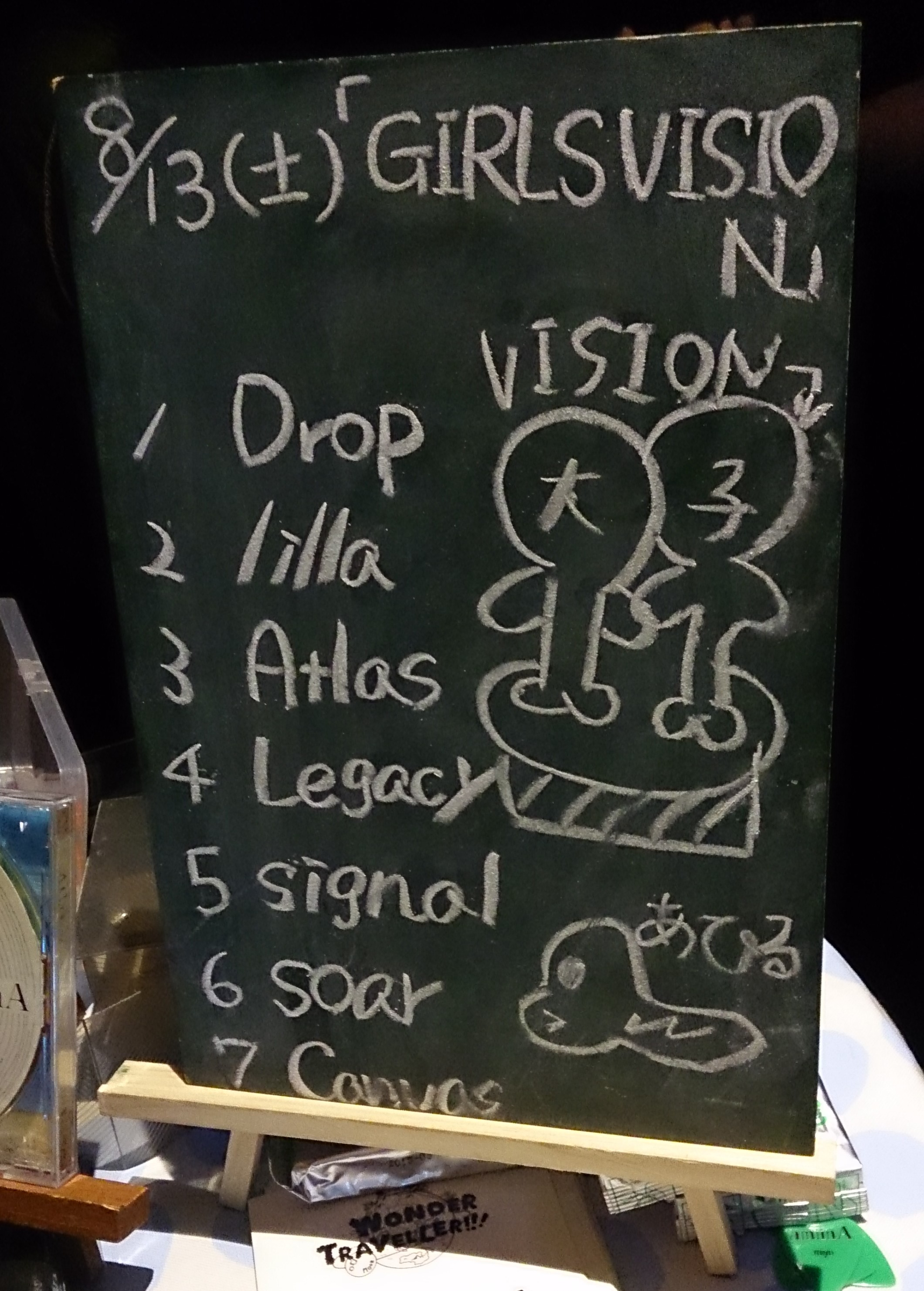 amiinAセトリボード(20160813(2))